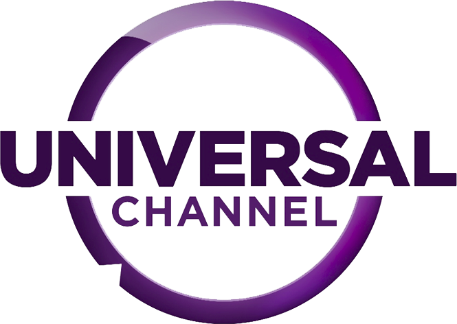 Logotipo do canal Universal Channel, usado no Brasil a partir do dia 01 de Julho de 2013...